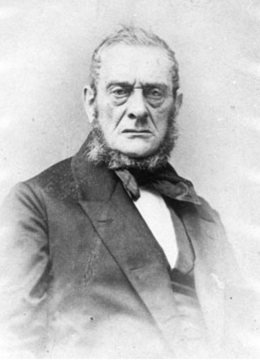 Prof. Dr. Jacob Baart de la Faille, Rijksuniversiteit Groningen